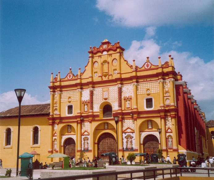 Catedral de San Cristobal de Las Casas.